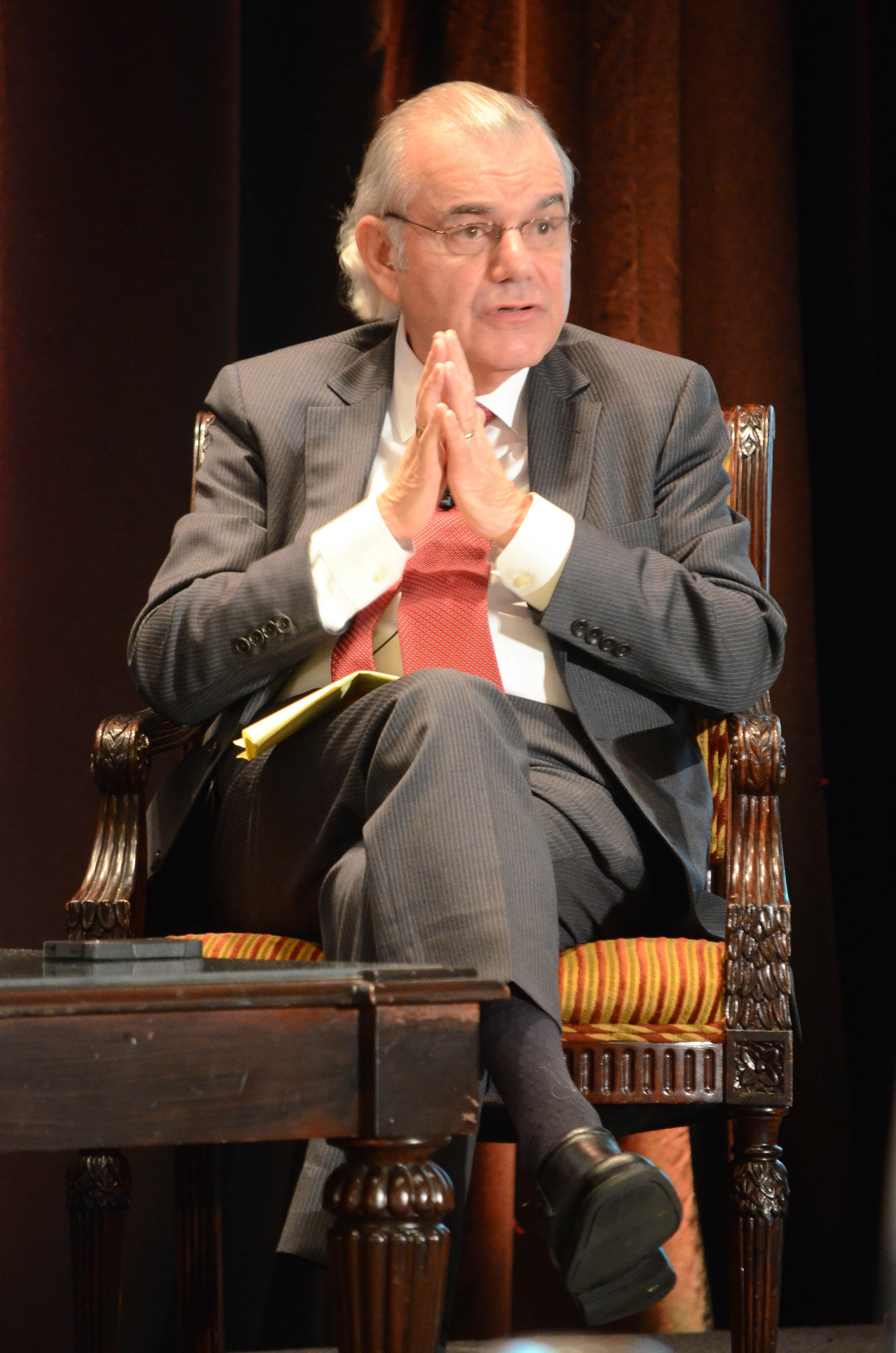 Judge Eduardo Robreno